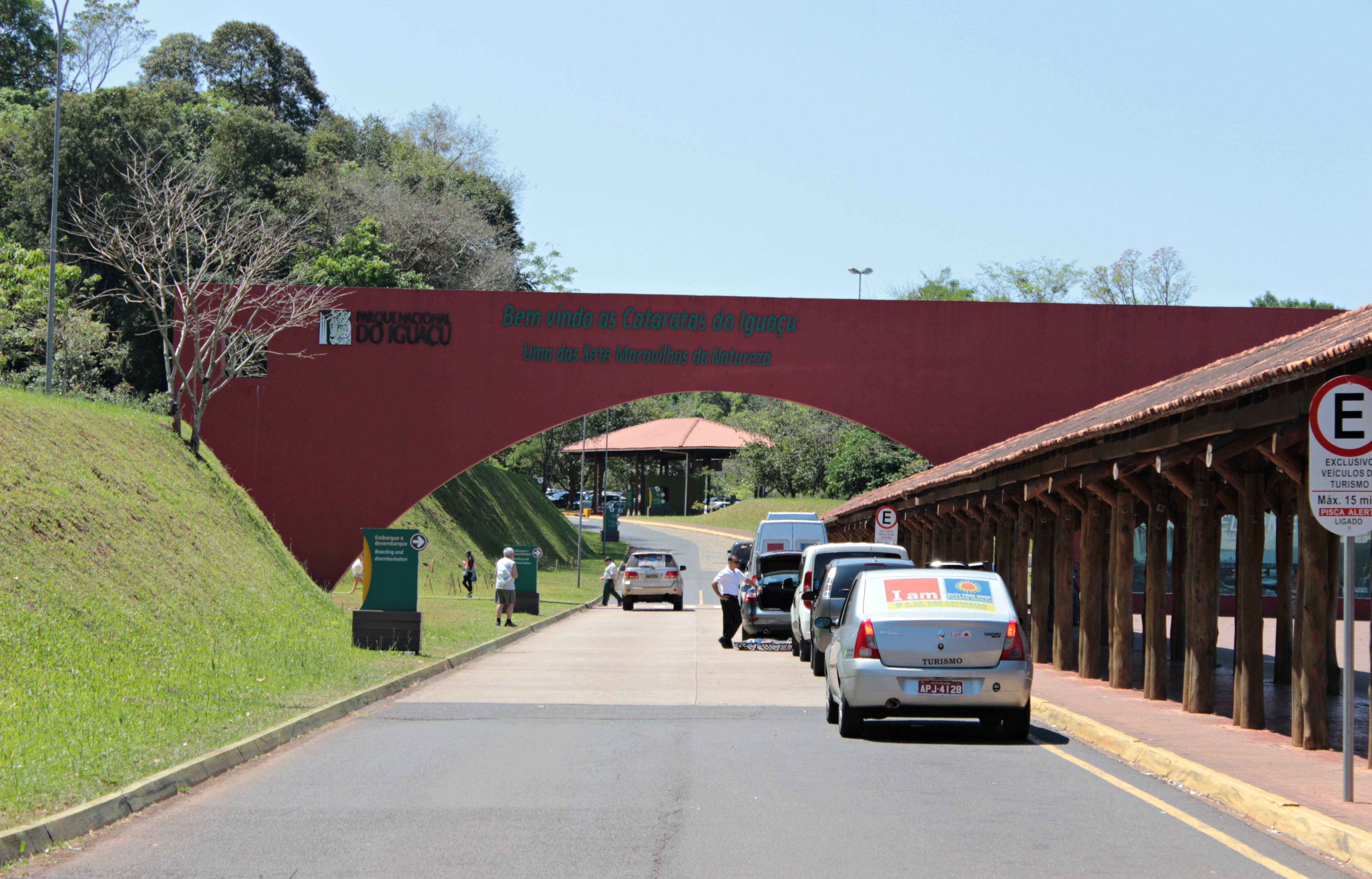 Esta é a entrada para pedestres e para carros do Parque Nacional do Iguaçu, onde existe uma excelente estrutura de estacionamento e pontos de ônibus.